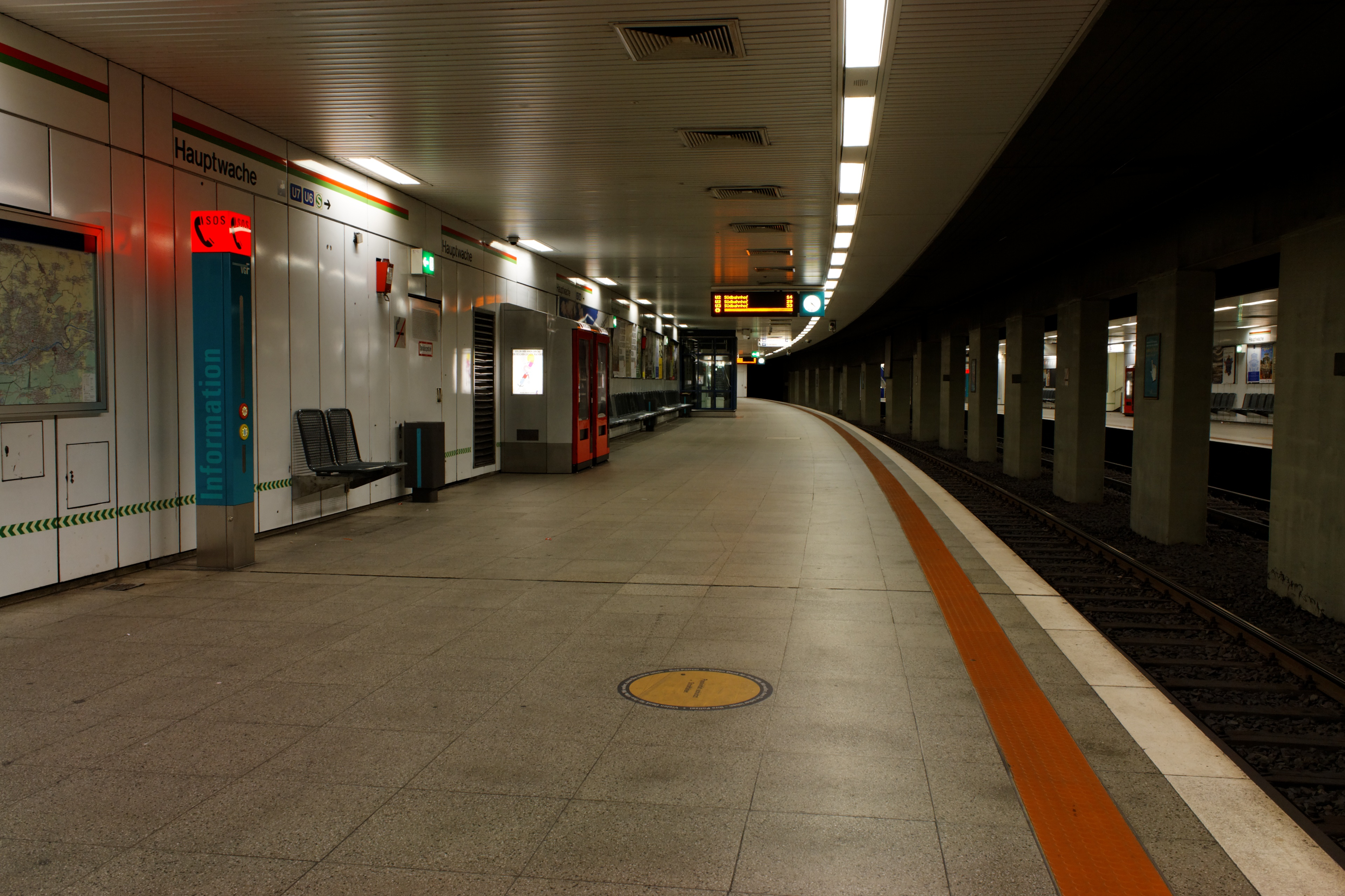 U-Bahn-Station Hauptwache der U-Bahn Frankfurt